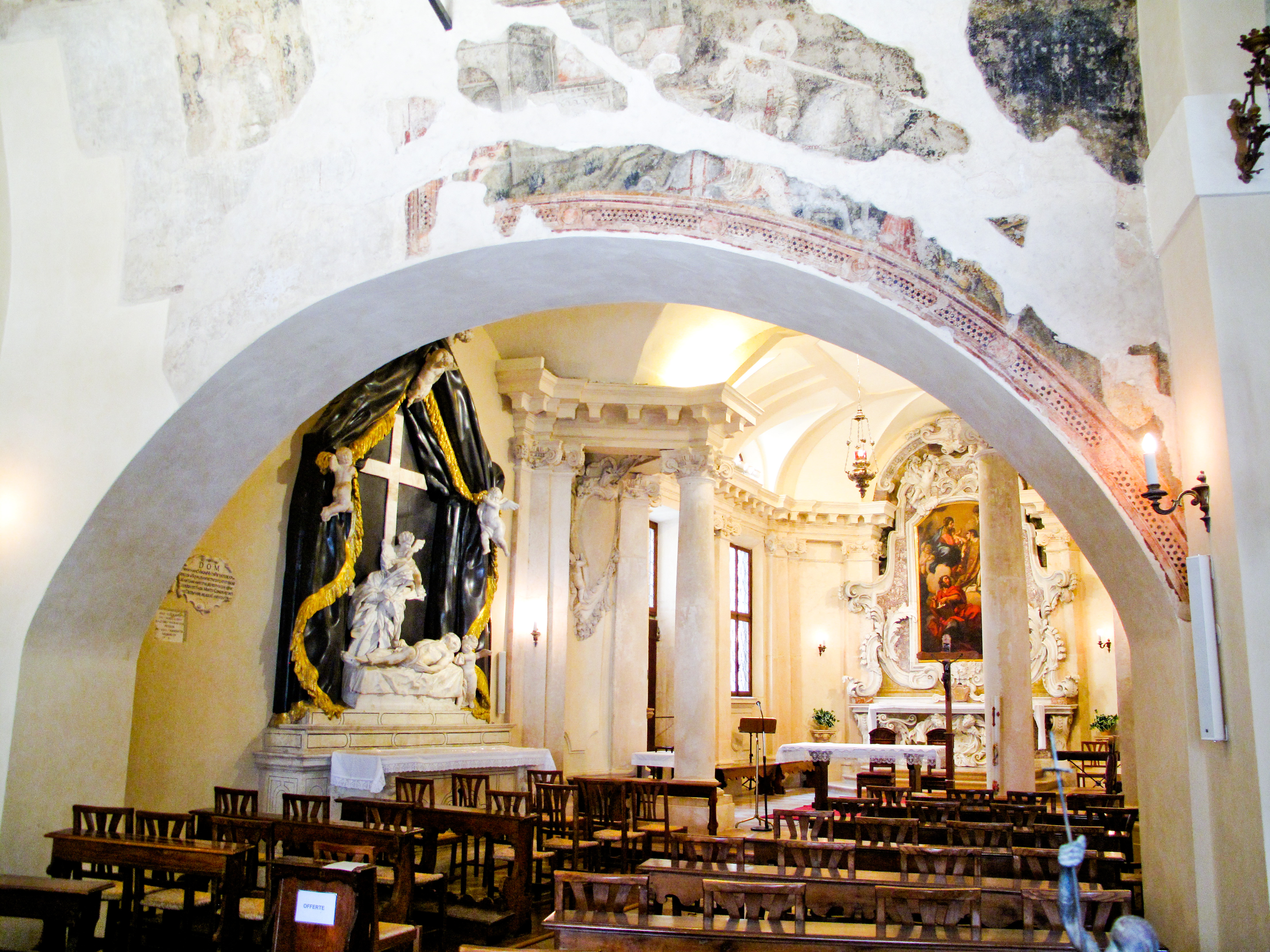 Vicenza - Chiesa di San Vincenzo - Ingresso